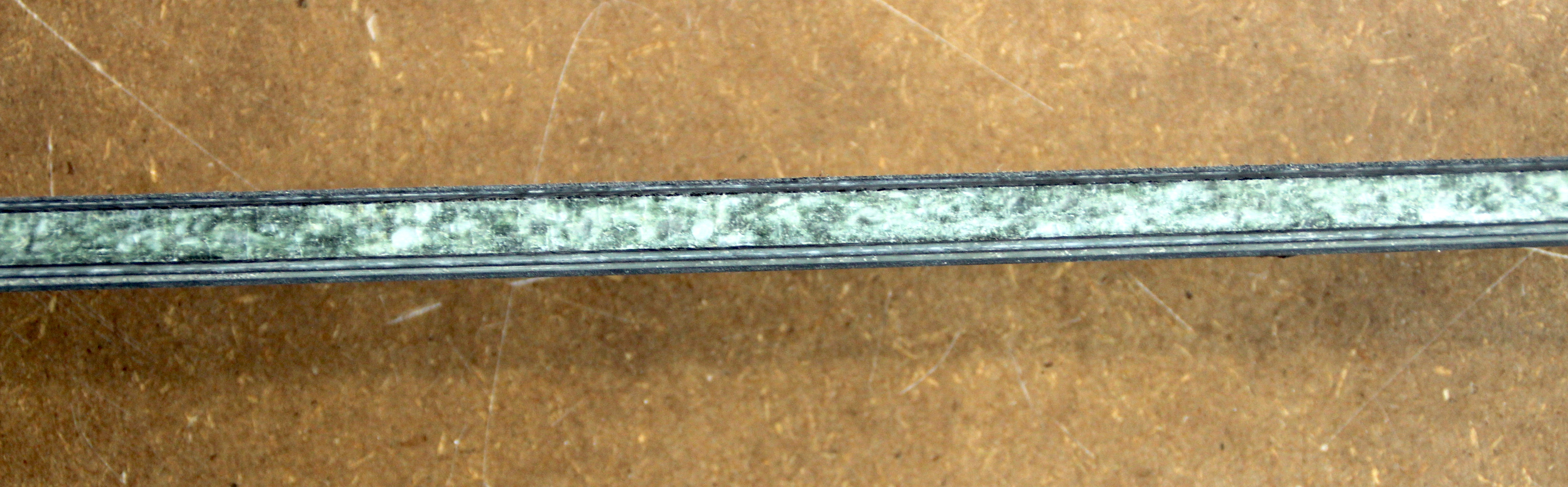 zai Querschnitt mit Steinkern